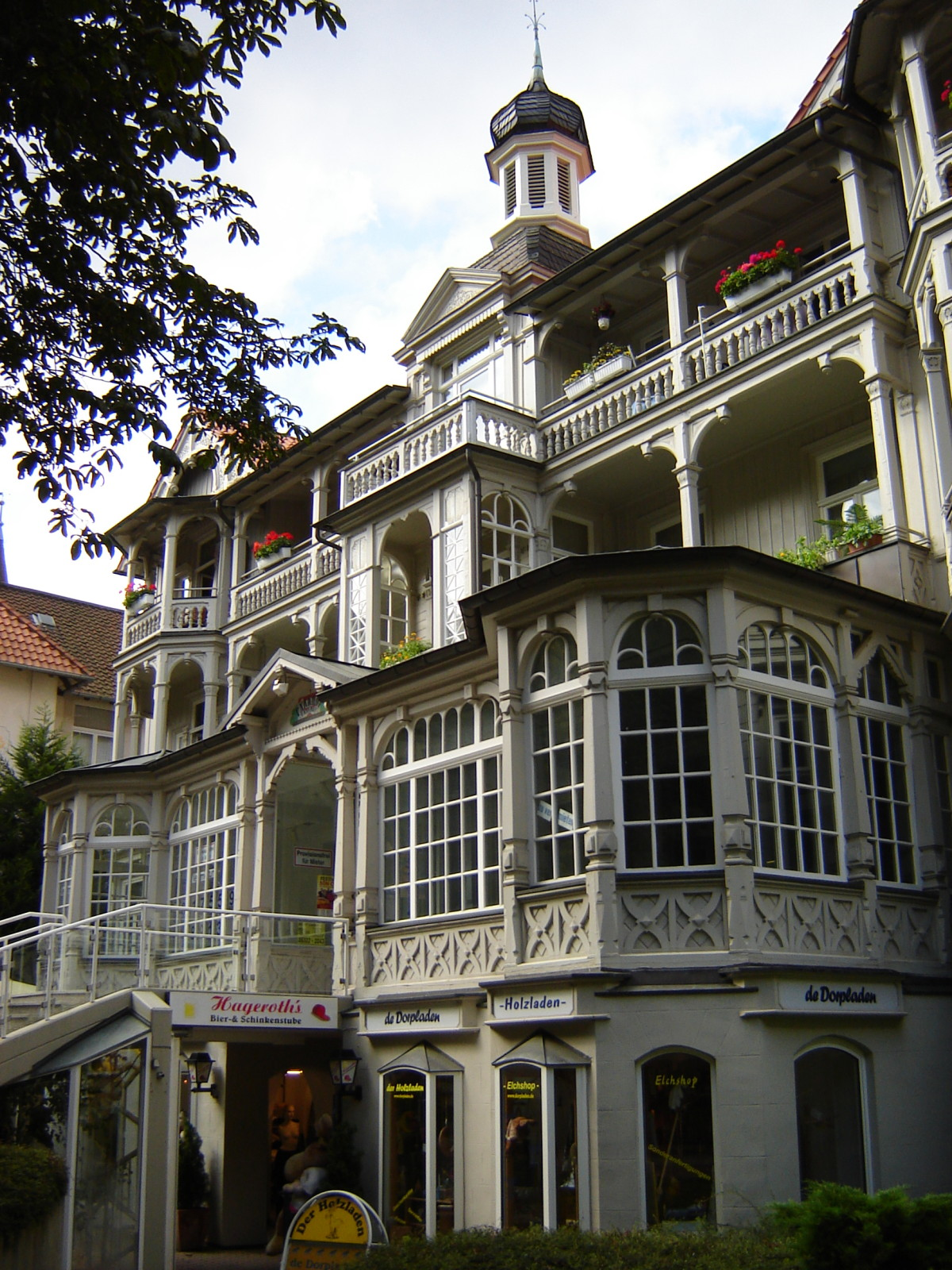 Haus in der Innenstadt Bad Harzburg